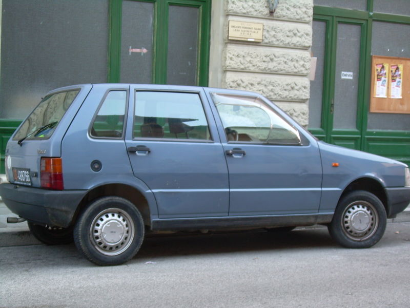 Autore: Powering Una Uno prima serie.